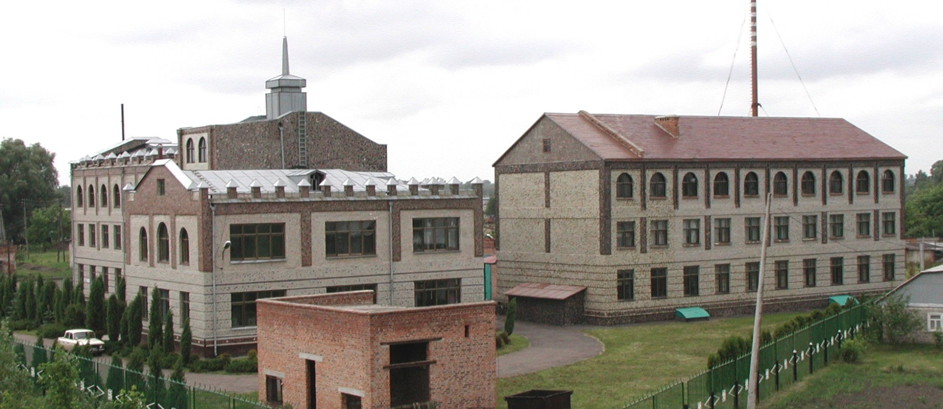 На фото показані панорама лабораторного та лабораторно-виробничого корпусів ТОВ "НЛСП. збудованих підприємством за рахунок самофінансування протягом 1993-1997 рр. Дослідні та виробничі лабораторії дозволяли швидко переходити від розробок до серійного випуску наукоємної продукції - лазерної медичної апаратури та навчальних приладів. В будівлі лабораторного корпусу працювала офтальмологічна клініка "КВЕЛТА-Мед" (Скроч. від Квантово-електронні технології в медицині), в якій використовувалася лазерна скануючи медична апаратура виробництва ТОВ "Ніжинські лабораторії скануючих пристроїв".